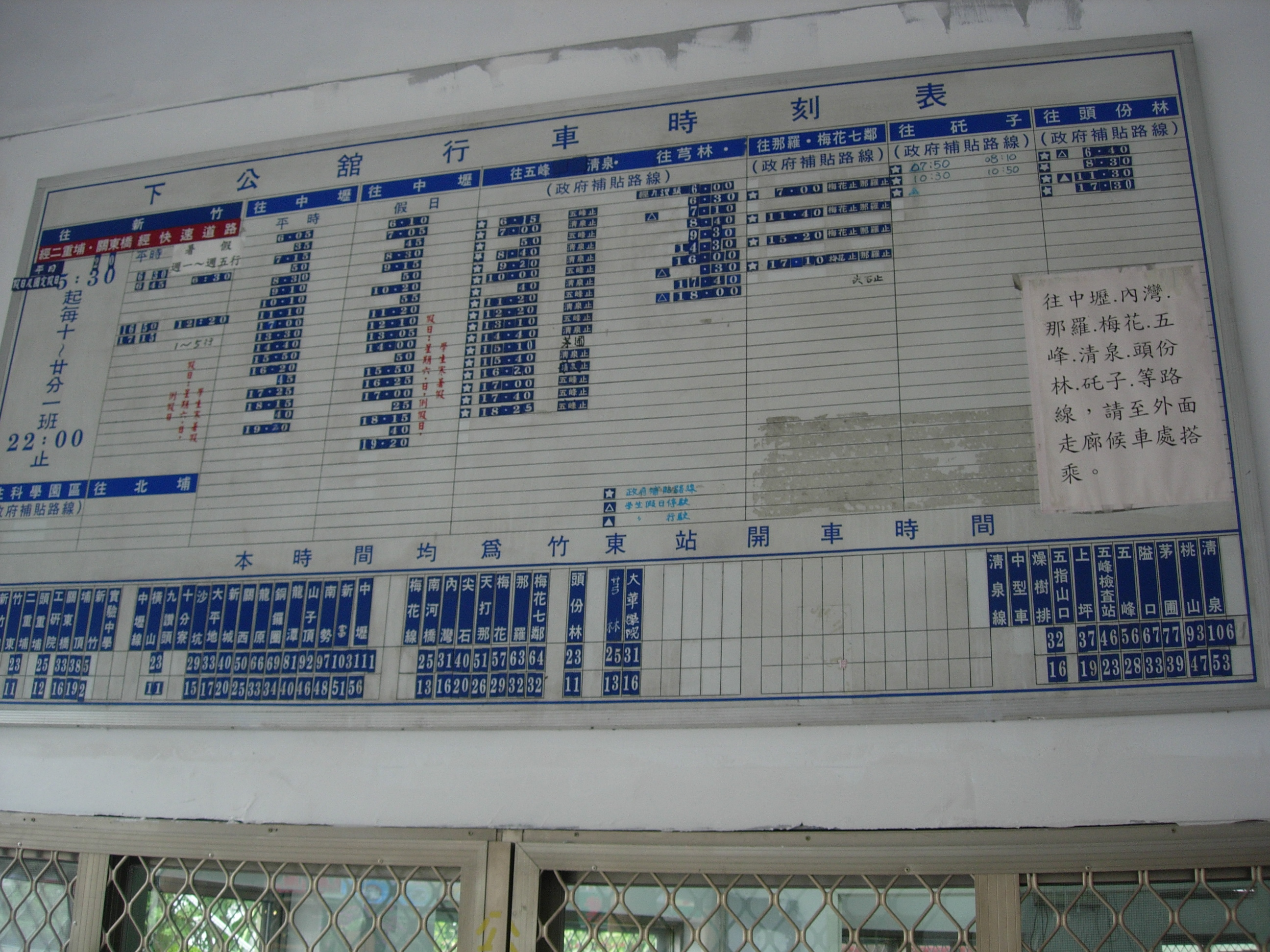 中文（台灣）: 新竹客運下公館站時刻表